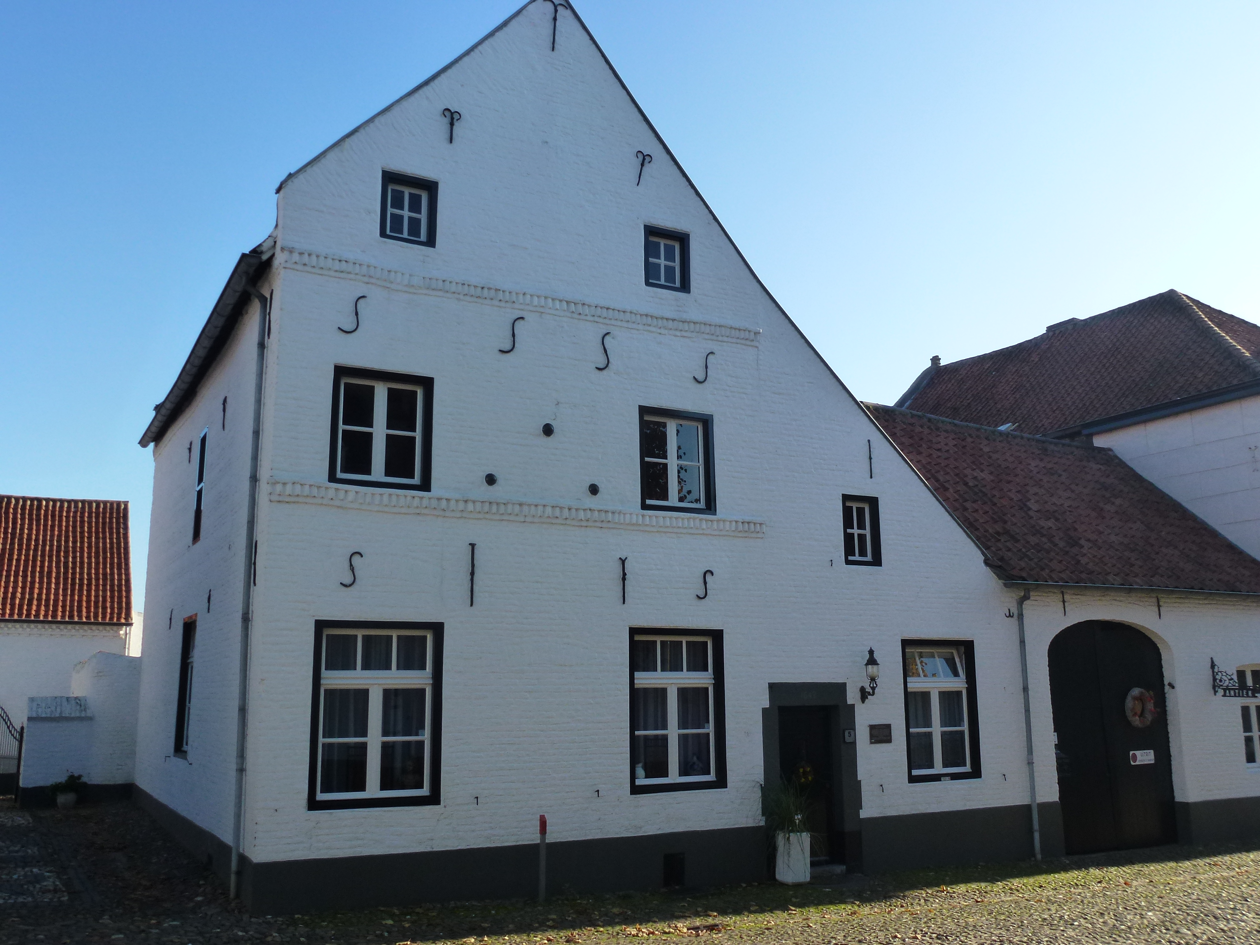 Hofstraat 5 Thorn. Het huis met de drie kogels. De drie kogels zijn ingemetseld ter herinnering aan de vrede van Munster in 1648, het jaar waarin het huis gebouwd werd.